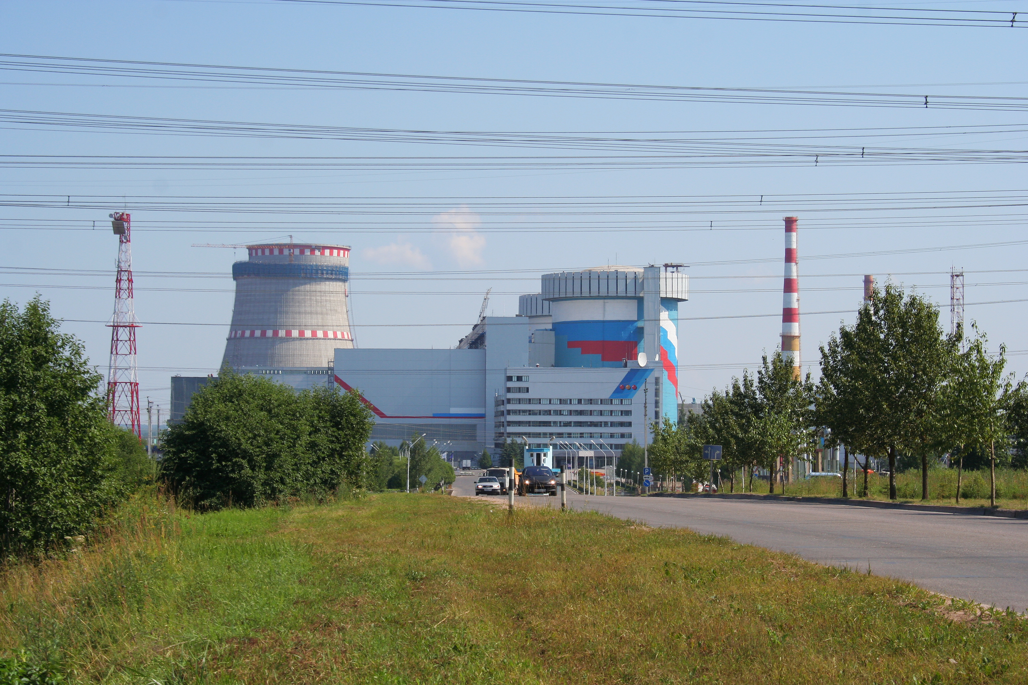 Stadt Udomlja (Oblast Twer, Russland). Blick auf das Kernkraftwerk Kalinin nördlich der Stadt.